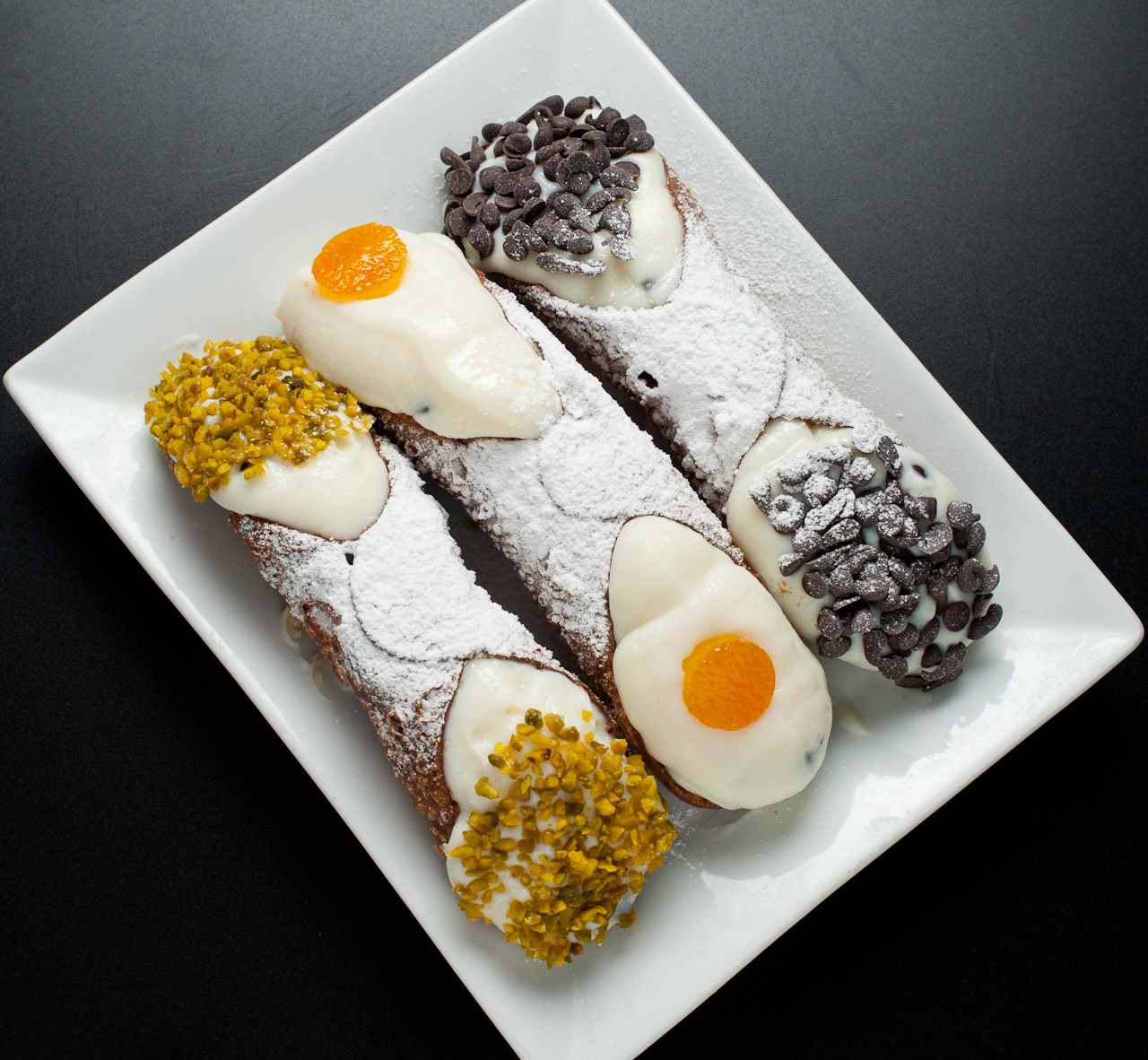 cannoli siciliani